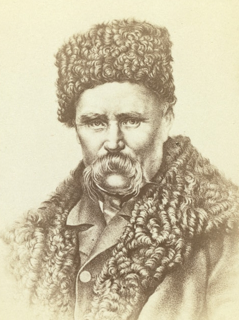 Ukrainian poet Taras Hryhorovych Shevchenko (Тарáс Григóрович Шевчéнко) (1814-1861)